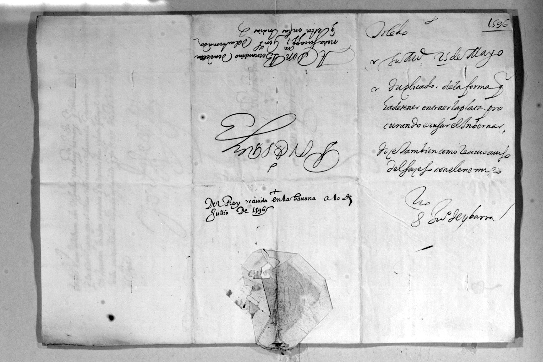 Signature